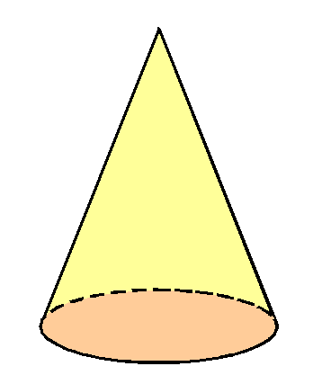 ruimtelijk figuur - eigen werk ism danielm - publiek domein